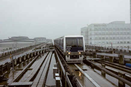 Métro automatique Yurikamome, reliant le quartier moderne d'Odaiba (Tokyo), île de Honshu, Japon, en 2000